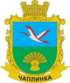 Герб Чаплинського району